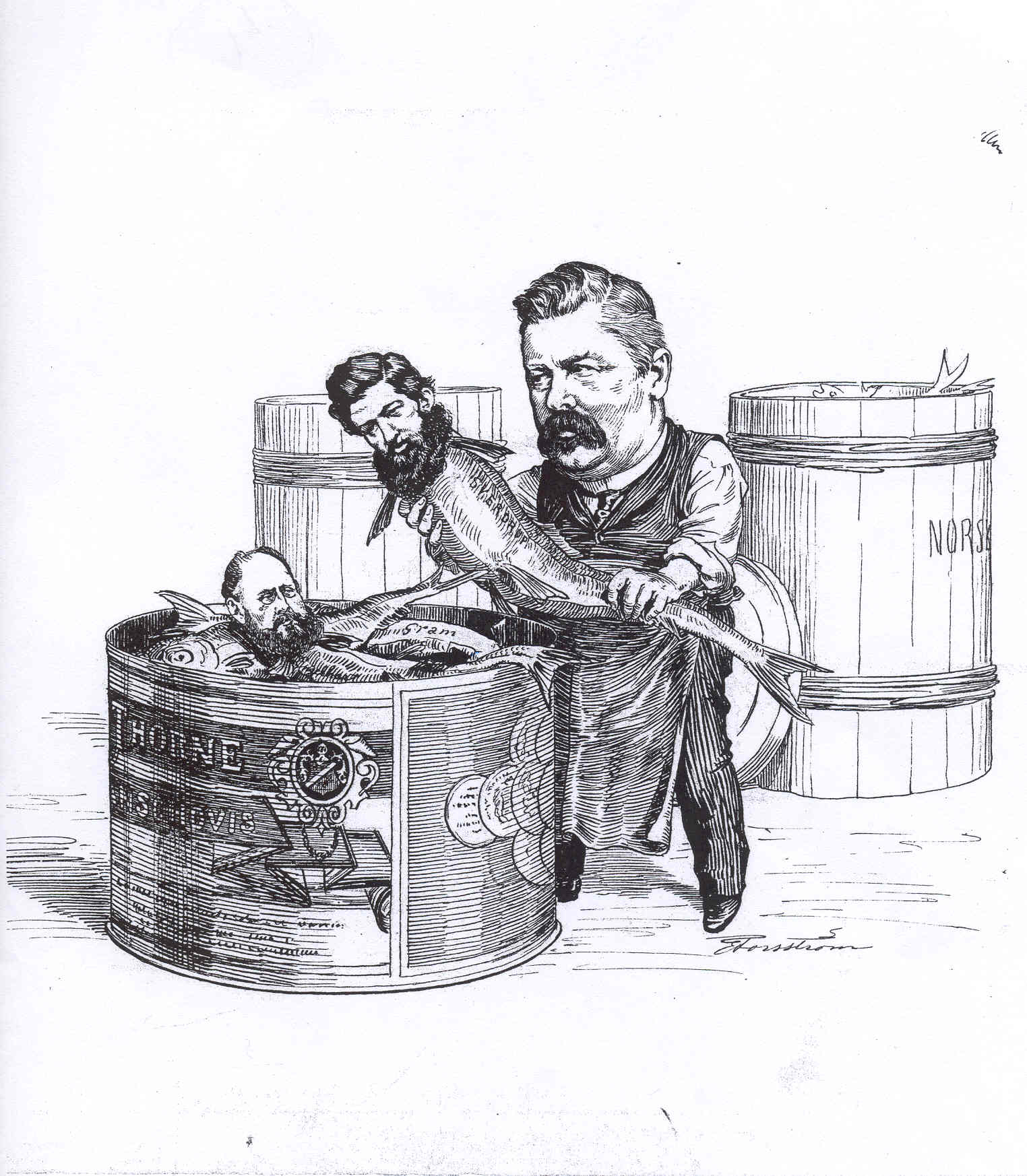 Bildtexten lyder ”Thornes ansjovis eller nytt ´inlägg´ i unionsfrågan. Den nyaste statsministerkandidaten : Om jag nu bara kunde få in den här, så hade jag dem alla som i en liten ask”. Bilden följs av en vers med rubriken ”Thornes ansjovis”. En av stroferna lyder: ”Wexelsen, Ullman och Lövland och Steen, ´venstrets fremragende kraefter´, ni som har känning i hufvud och ben ännu af dagen ´därefter´- säg, vill ni ha en rekreation? Vill ni få slut på en lång obstruktion? Vänner och bröder, så ta er en ´ren´! Smaka på Thornes ansjovis!” En tolkning är att den nya statsministerkandidaten på kungens uppdrag bland annat söker få med oppositionspolitiker från Venstre i den nya regeringsbildningen.